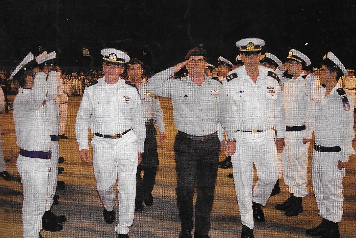 החלפת פיקוד בחיל הים דוד בן בעש"ט בצד ימין מסיים אלי מרום בצד שמאל מקבל. באמצע הרמטכ"ל גבי אשכנזי